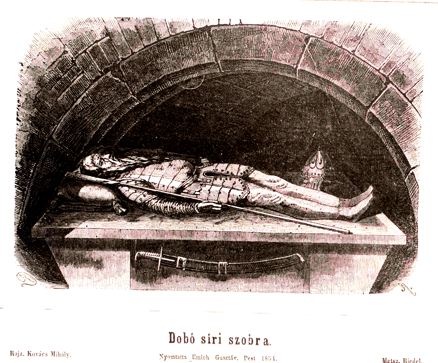 Dobó István, Eger hős védőjének síremléke. A hős ravatalon fekszik. Hosszu szakálla mellére borul, testét pánczél födi, egyik kezében zászlórudat tart, lábainál sisakja áll